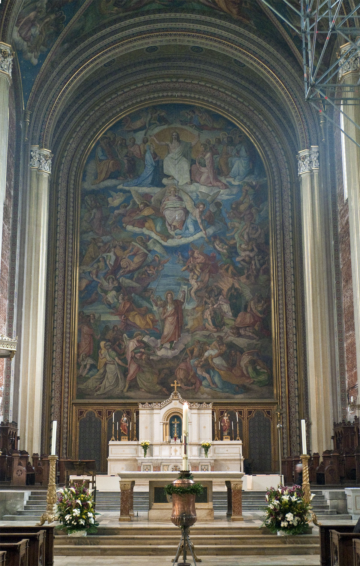 Ludwigskirche-München-Altar